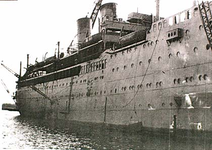 Die britische Arandora_Star 1940 als Marinetransporter